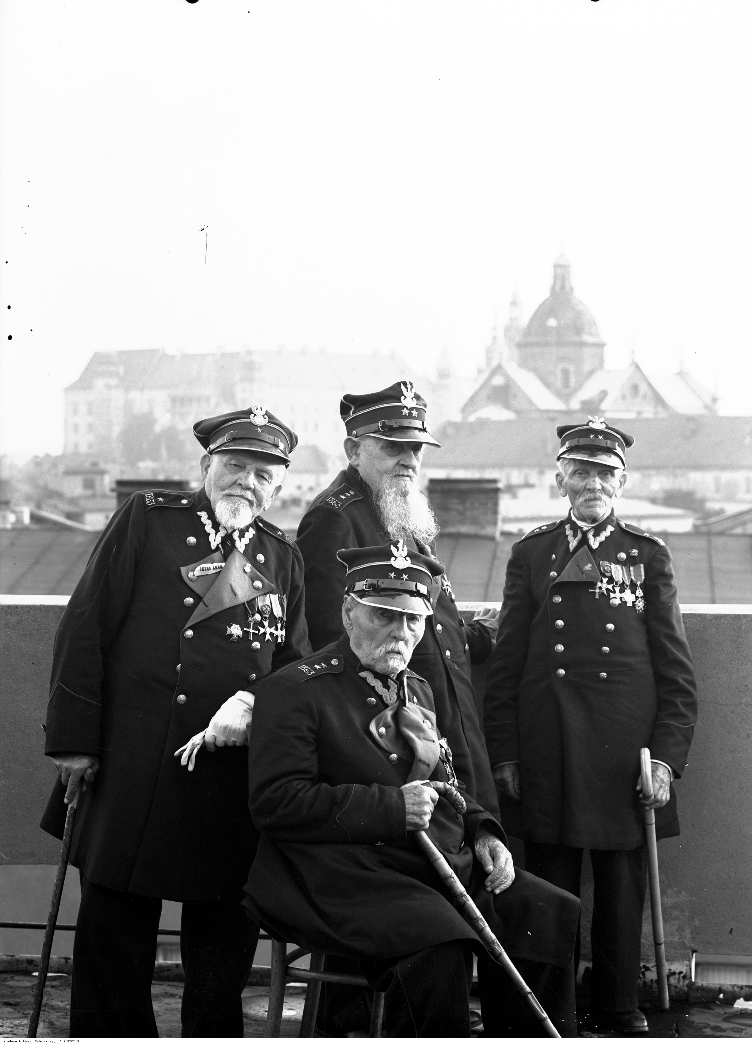 Weterani powstania styczniowego na dachu Pałacu Prasy. Siedzi Wiktor Malewski. Stoją od lewej: Antoni Suss, Mamert Wandali, Walenty Milczarski.